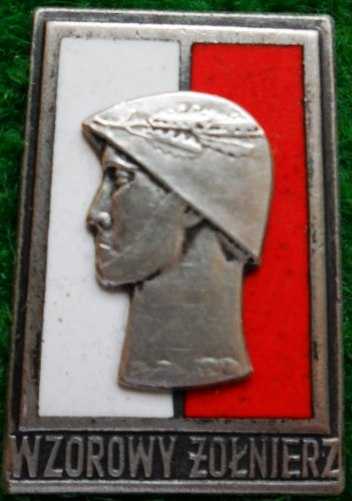 Wzorowy Żołnierz - brązowa